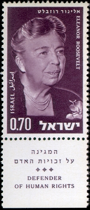 בול - אלינור רוזוולט